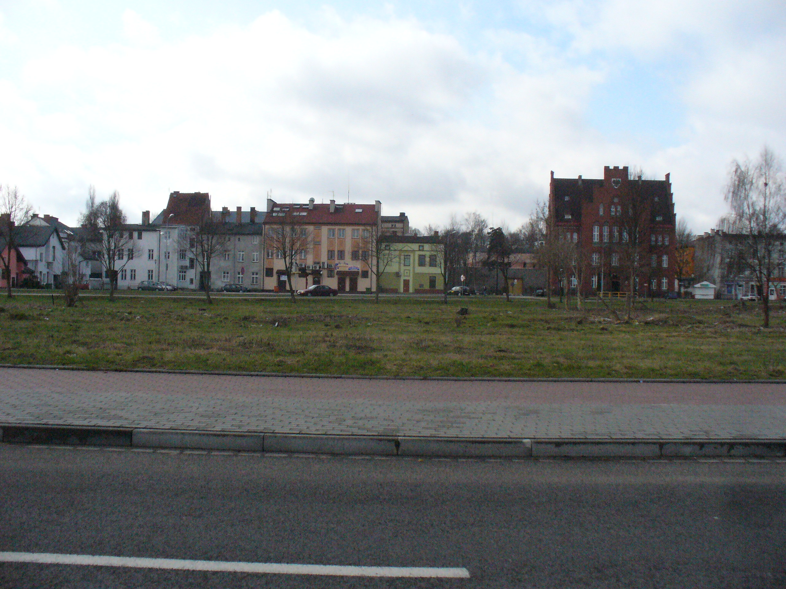 w oddali ulica Jana Pawła II